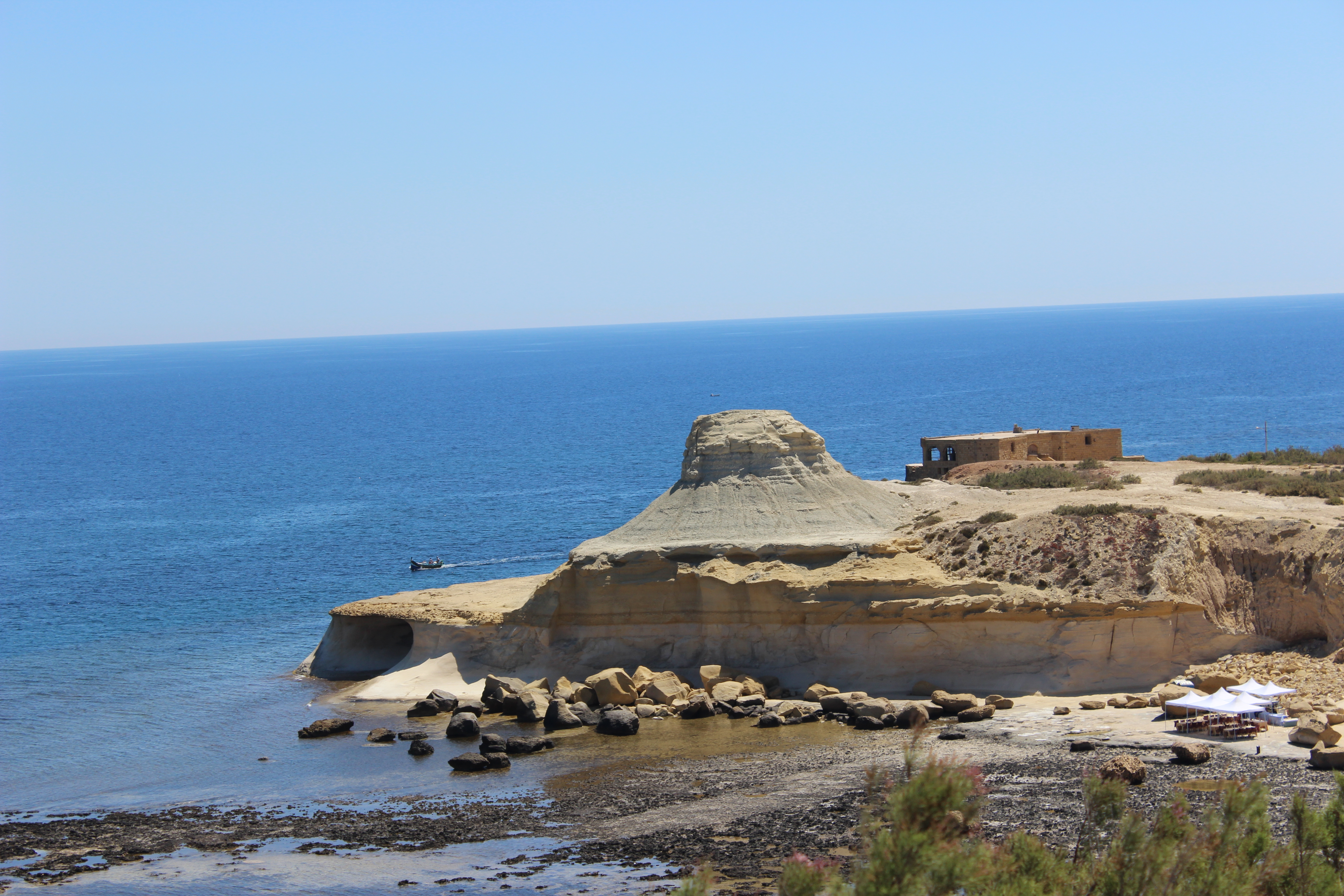 Gozo